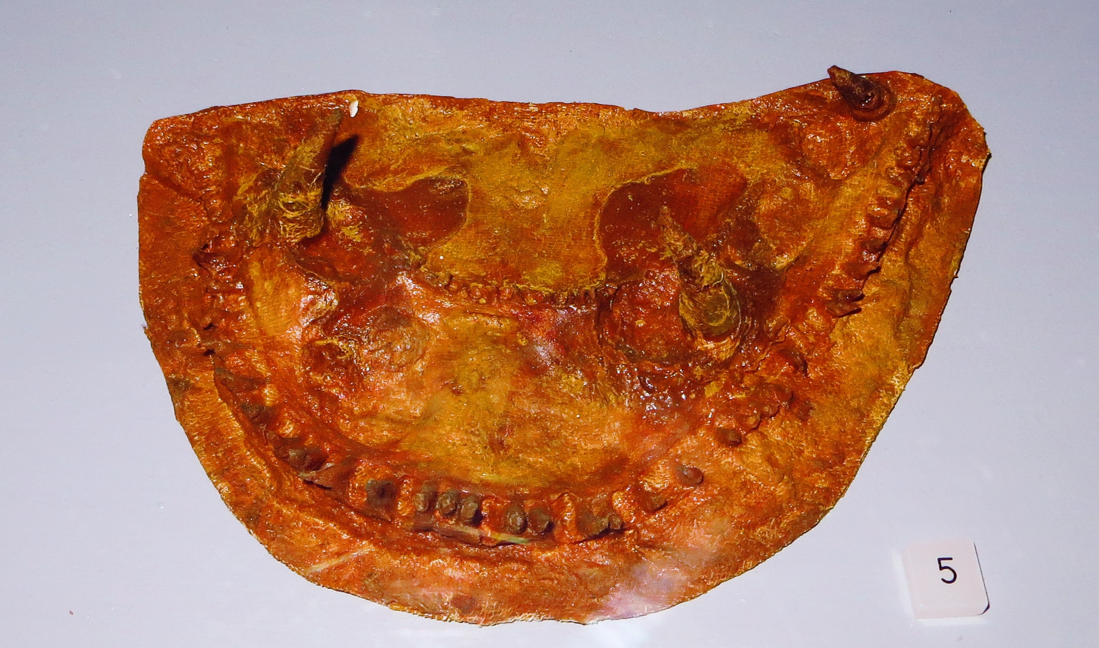 Fossil of Heptasaurus, an extinct amphibian- Took the picture at Museum of Paleontology, Tuebingen